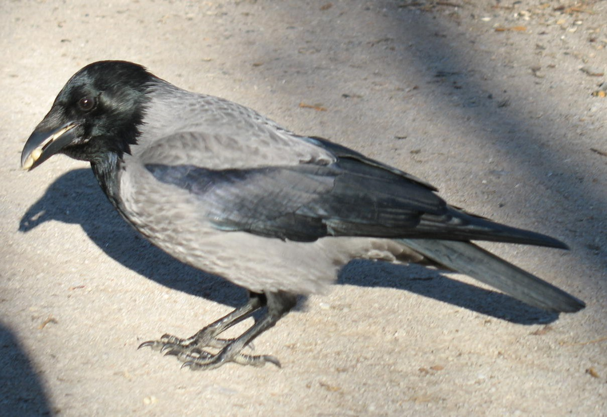 Corvus corone cornix Nebelkrähe groß. Grákráka.